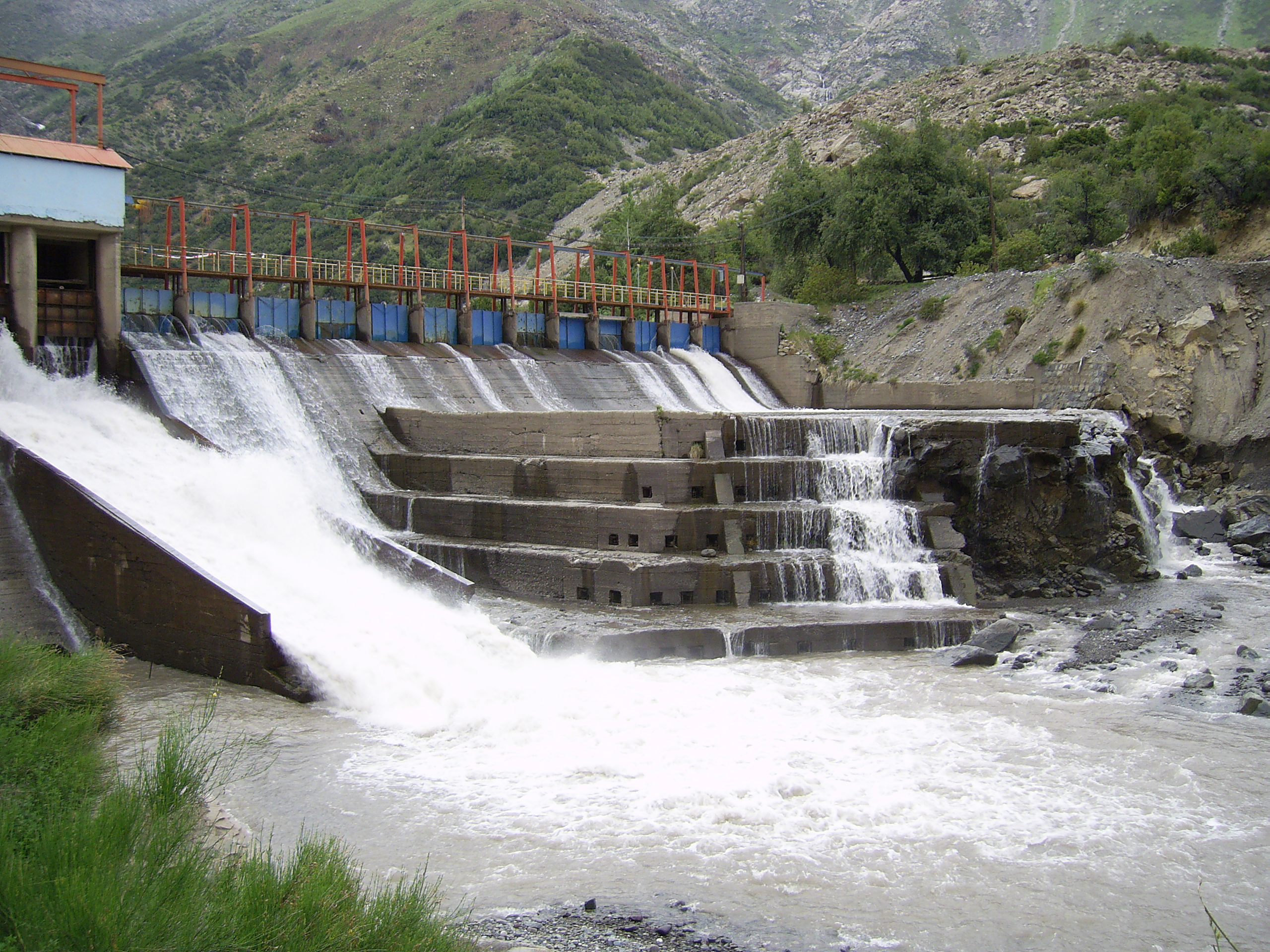 Machalí, Pangal.